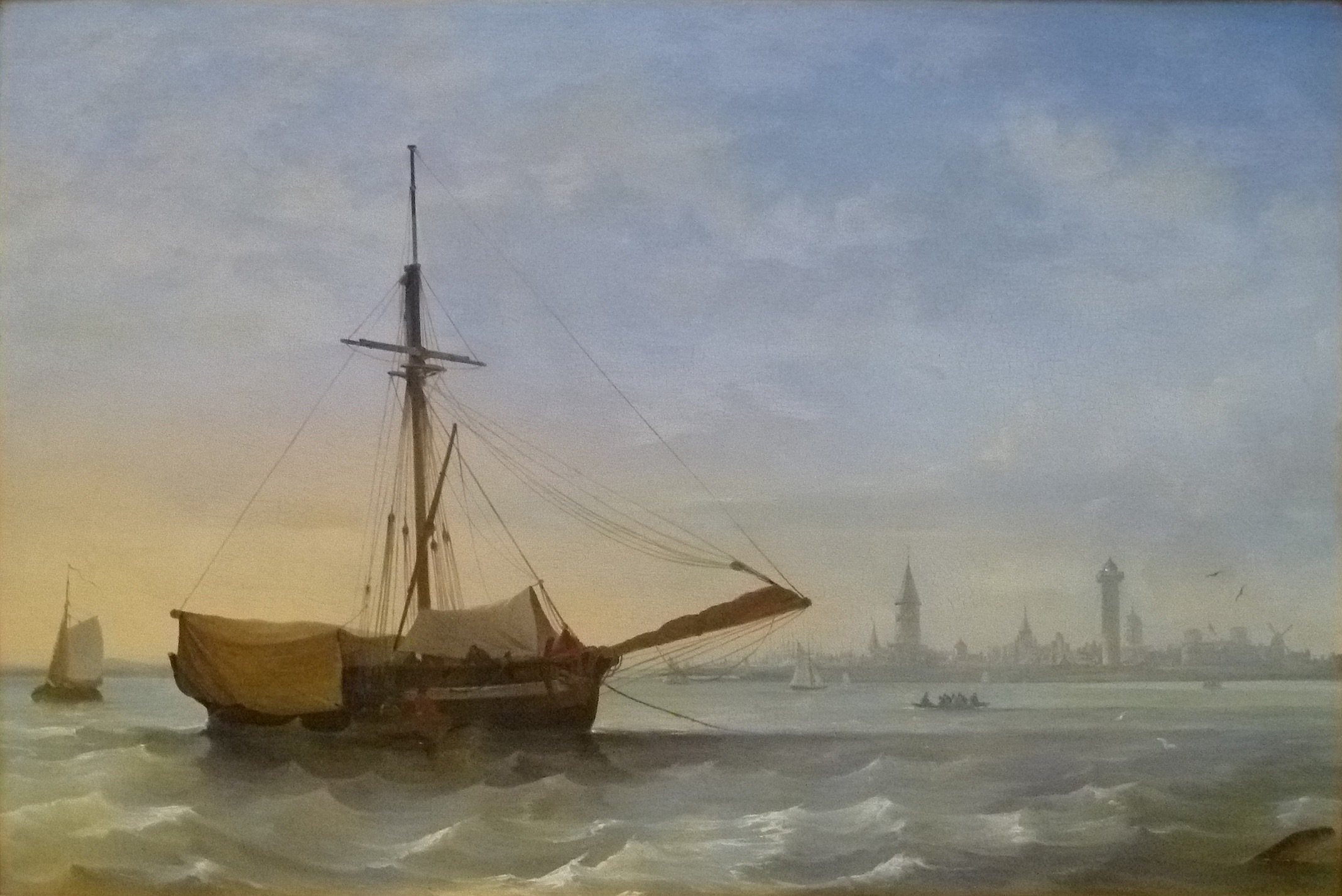 "Marine met zicht op Oostende", olieverf op paneel (42 x 63 cm) door de Belgische kunstschilder Désiré Donny (1798-1861); privébezit